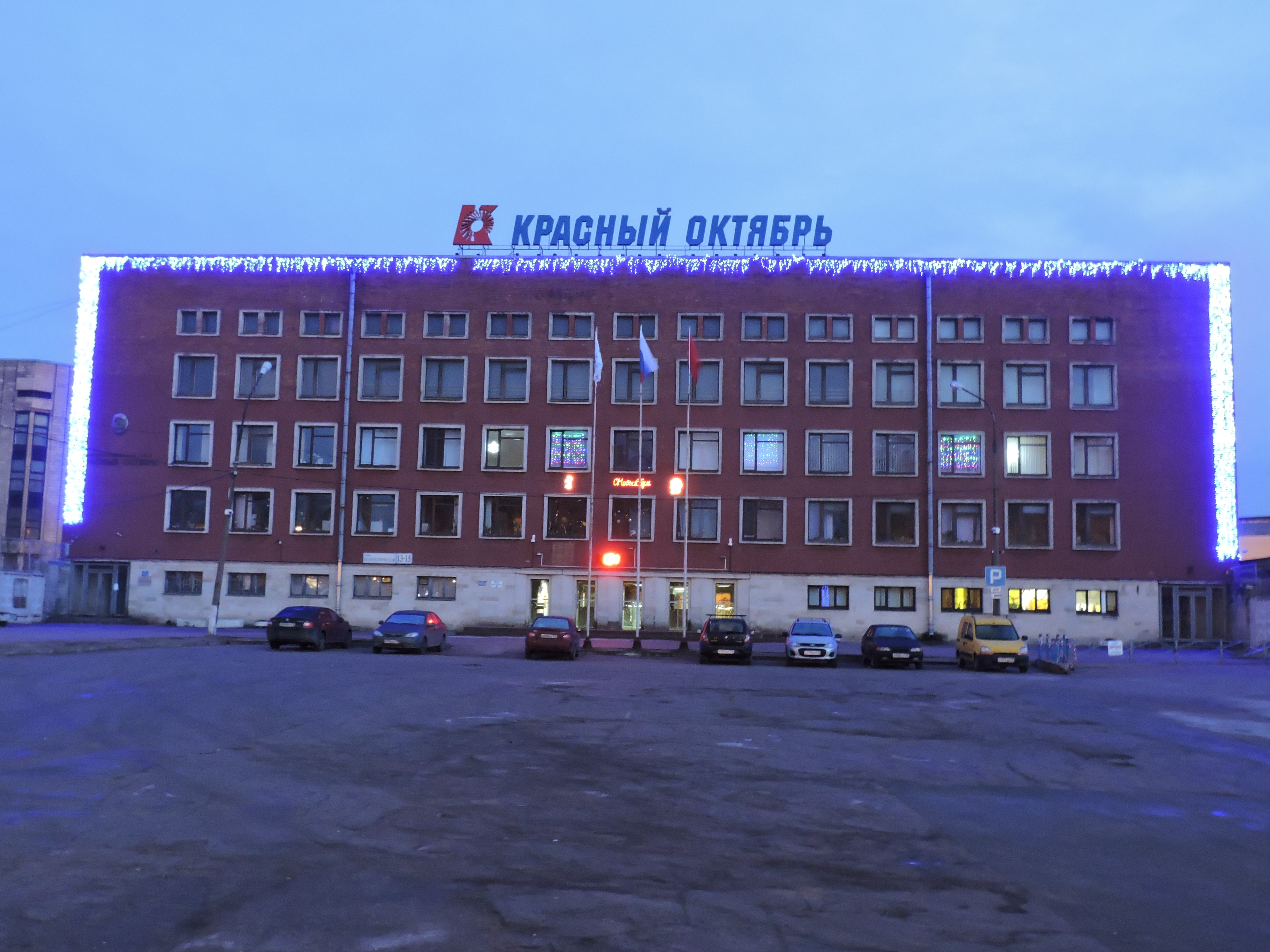 Заводоуправление ОАО «Красный Октябрь»